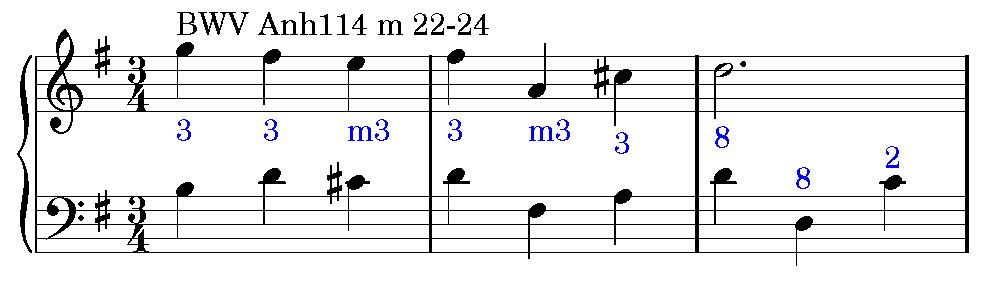 Analiza muzicala contrapunct.